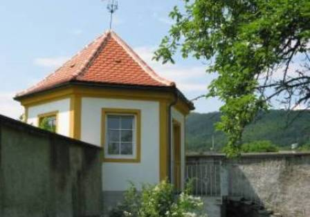 Gartenturm im Hellerhofgarten West, Paudorf